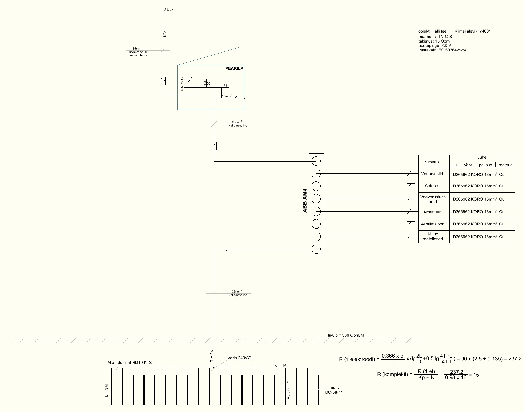 Maanduspaigaldise leht projektist